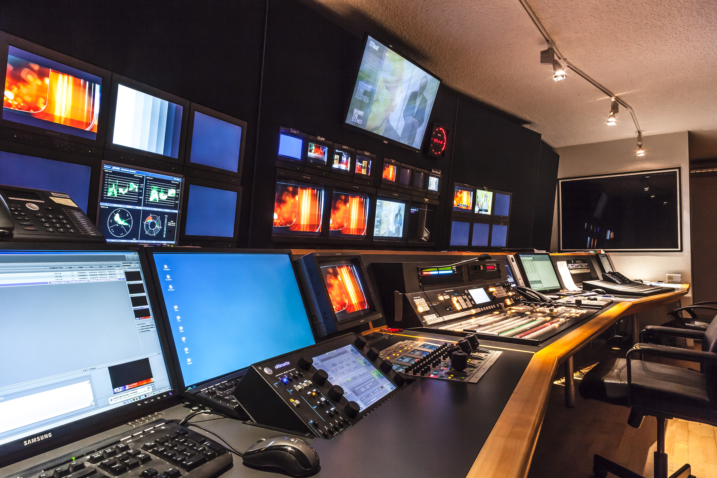 Telebasel Sende-Regie